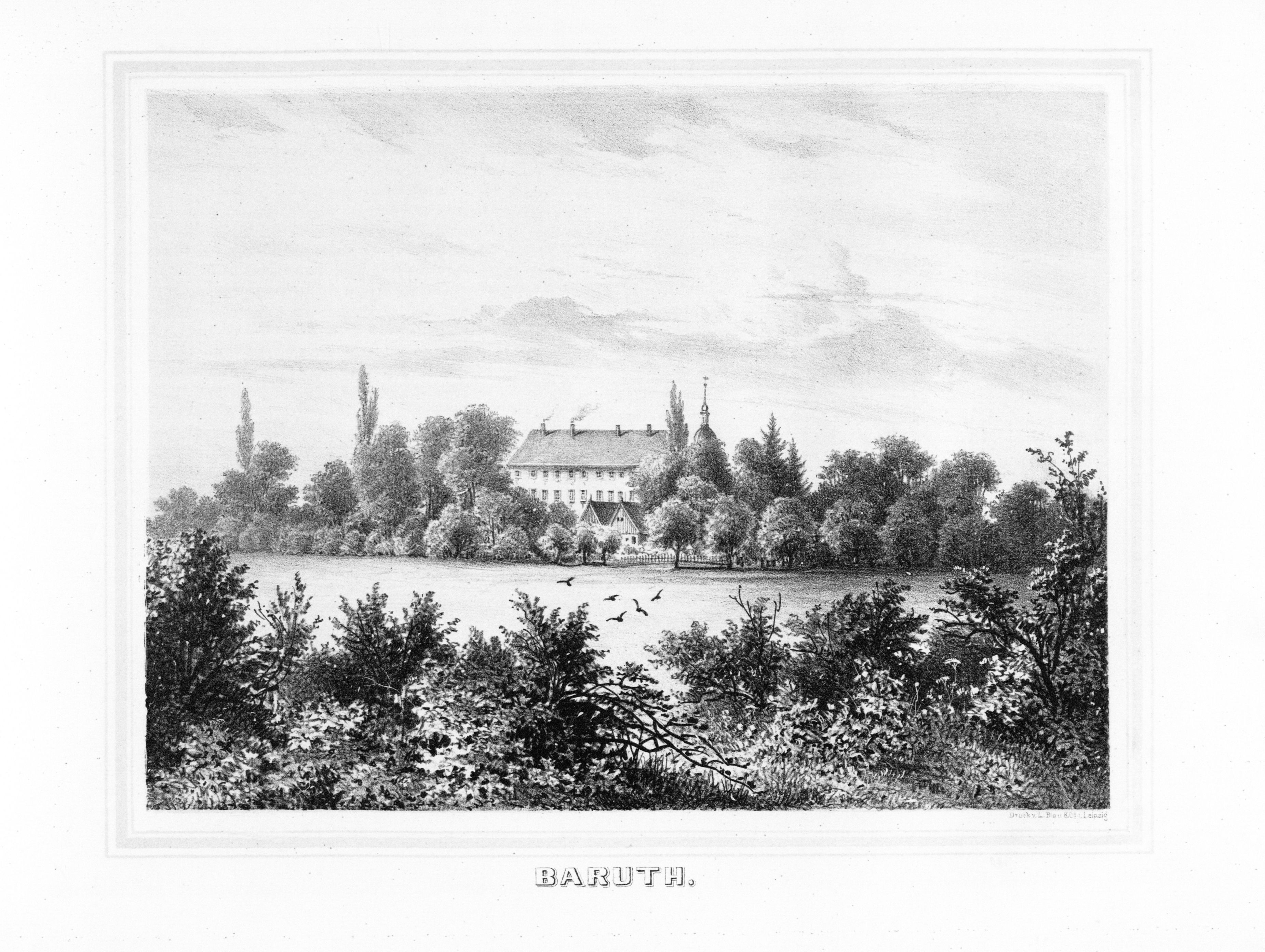 Baruth aus: Album der Rittergüter und Schlösser im Königreiche Sachsen Markgrafenthum Oberlausitz Section: III